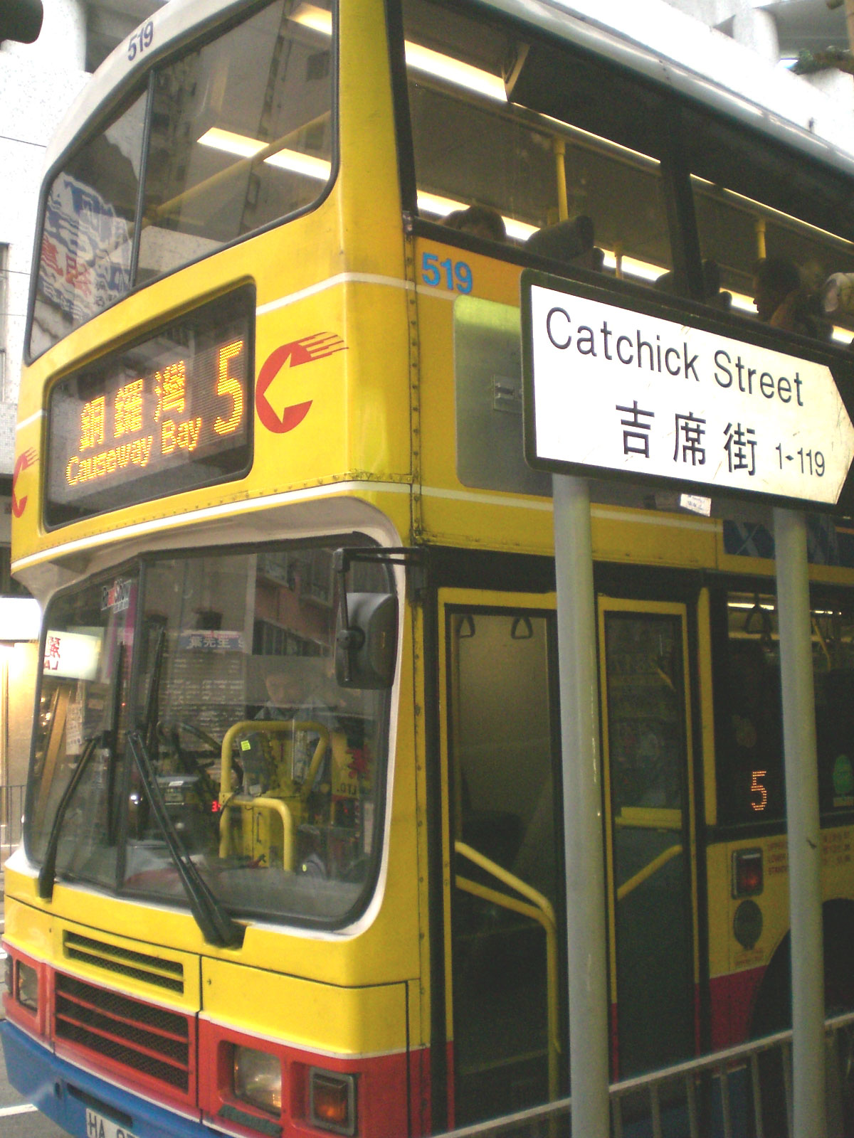 城巴 吉席街